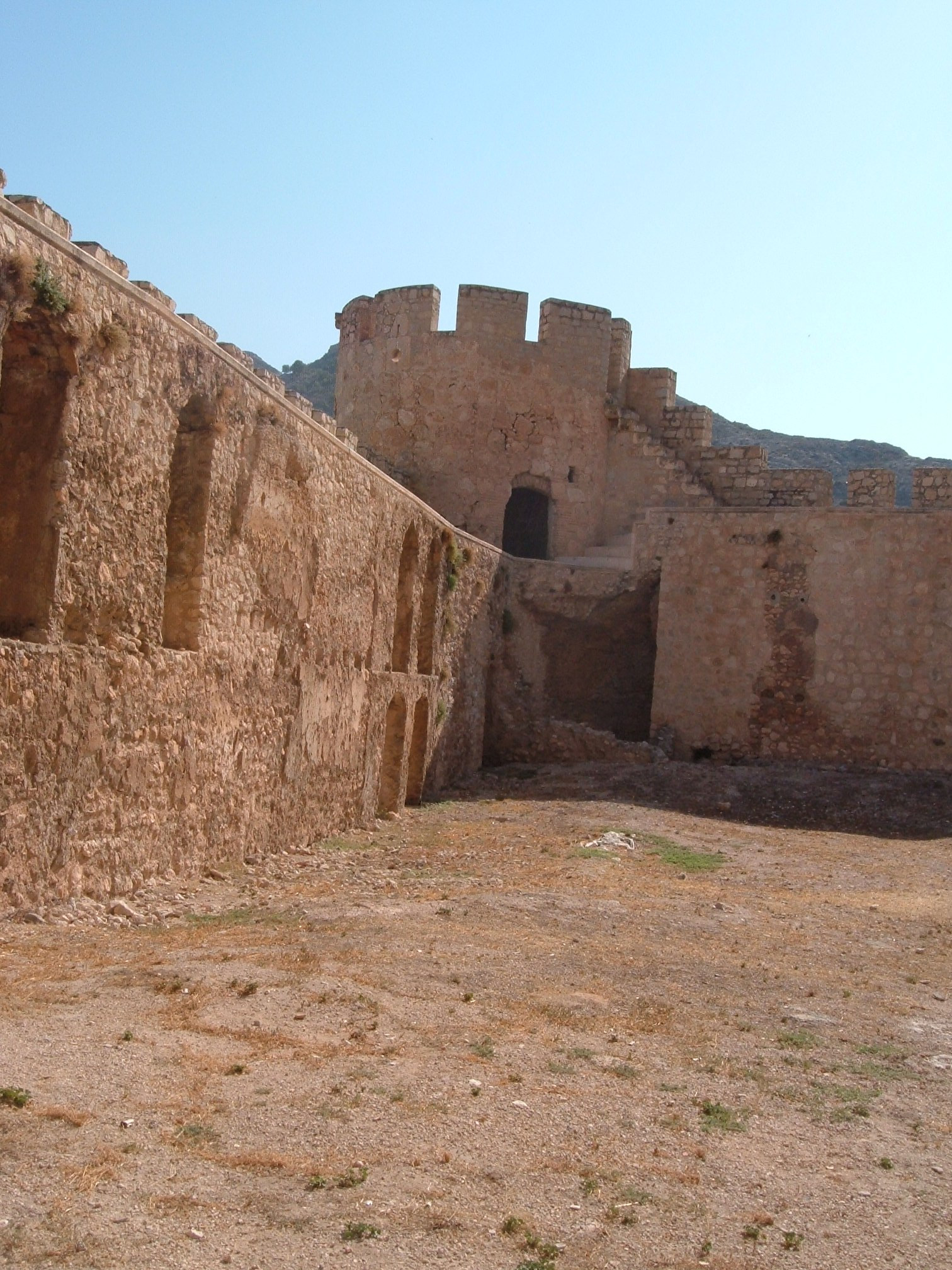 Plaza de armas del castillo de la Atalaya de Villena